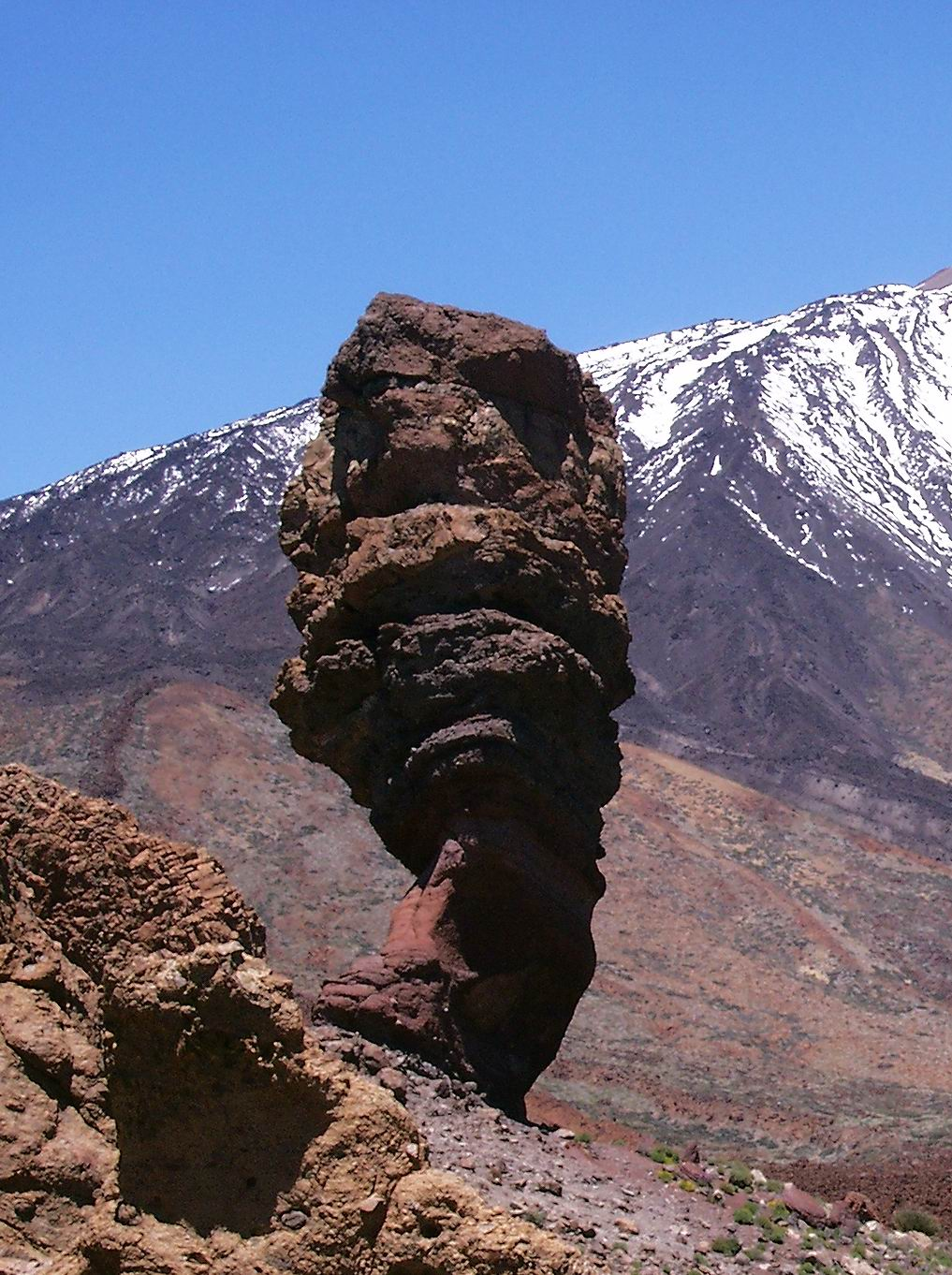 Los Roques de Garcia, Teneriffa